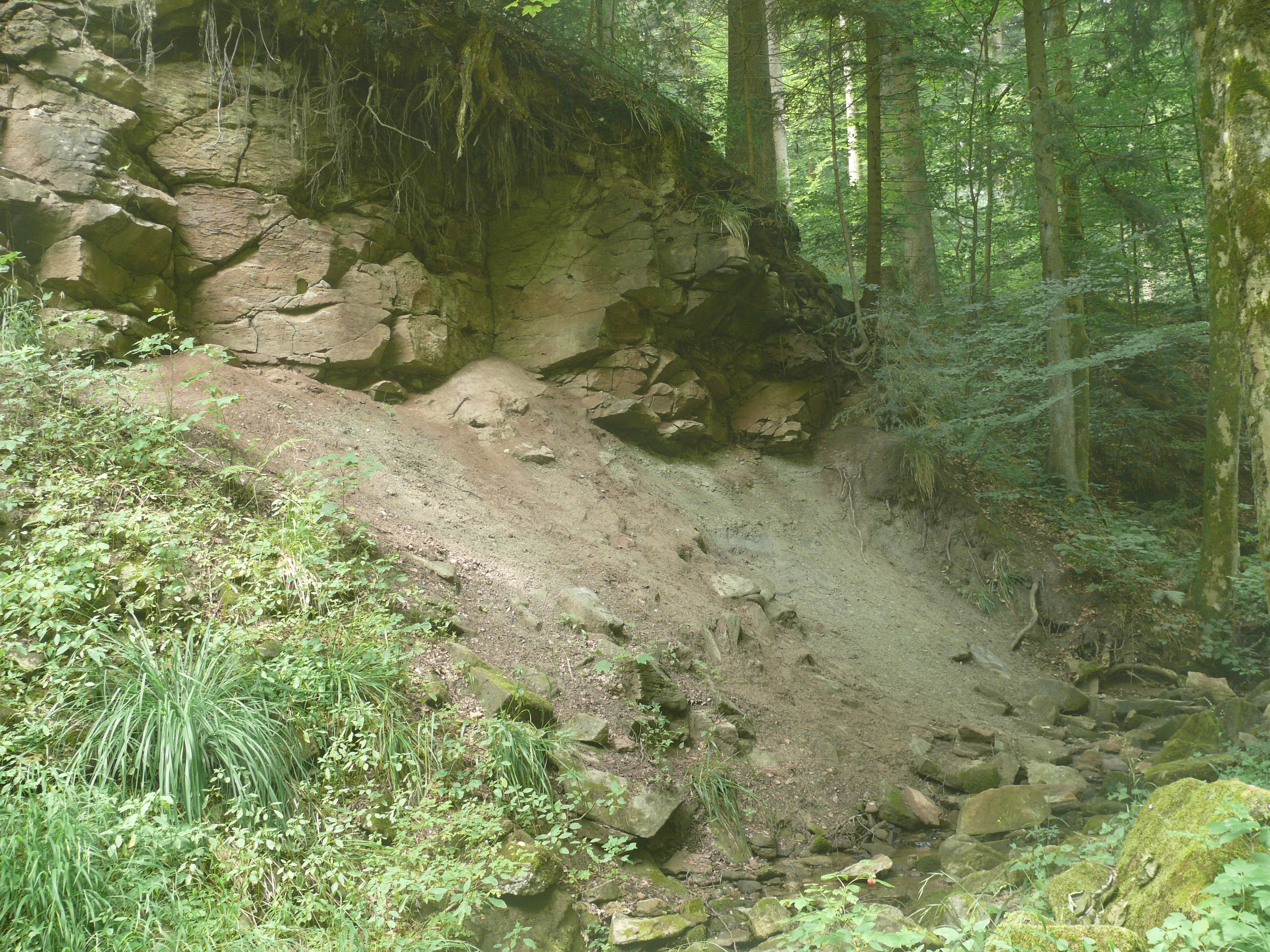 Teil des Typusprofils der Mainhardt-Formation (Obere Bunte Mergel) am Kümmelsbach (Kümmerlesbach), darüber untere Bereiche der Löwenstein-Formation (Stubensandstein) bei Mainhardt